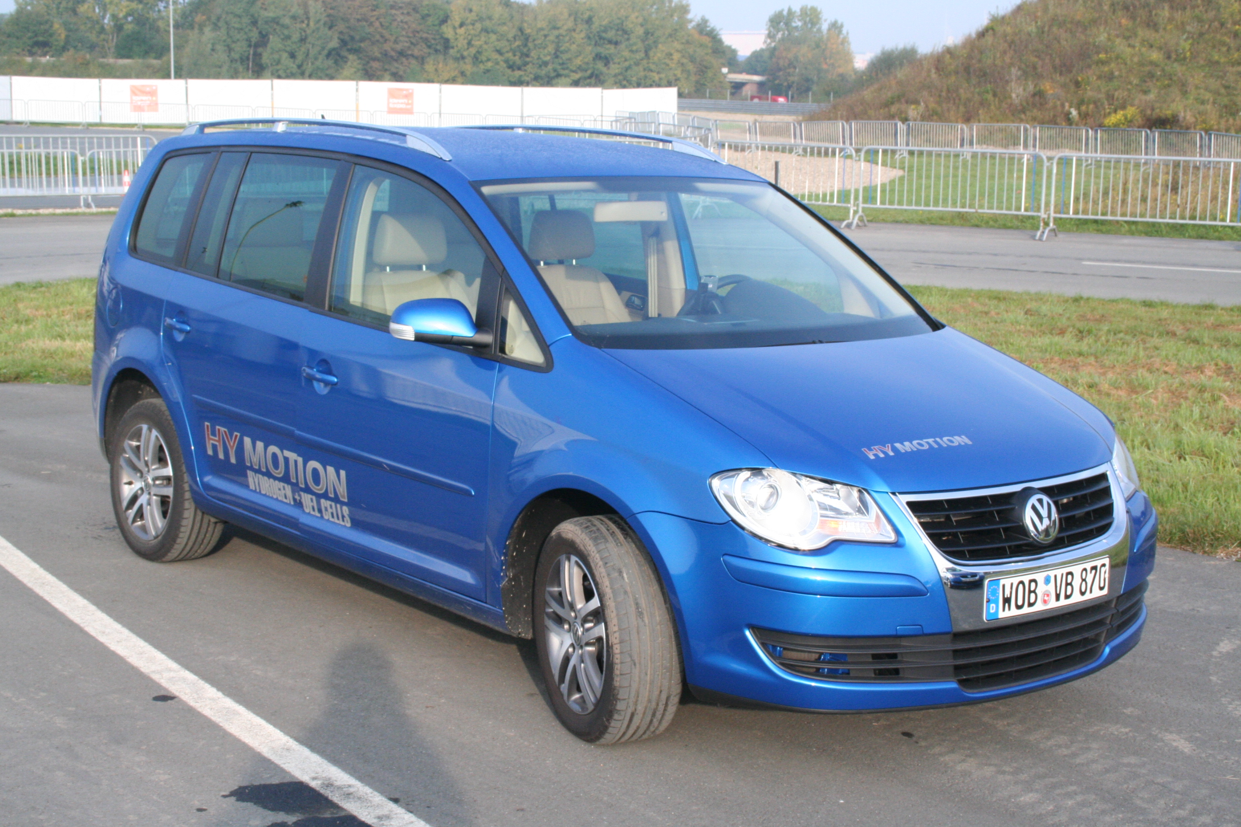 Volkswagen Touran Hy-Motion